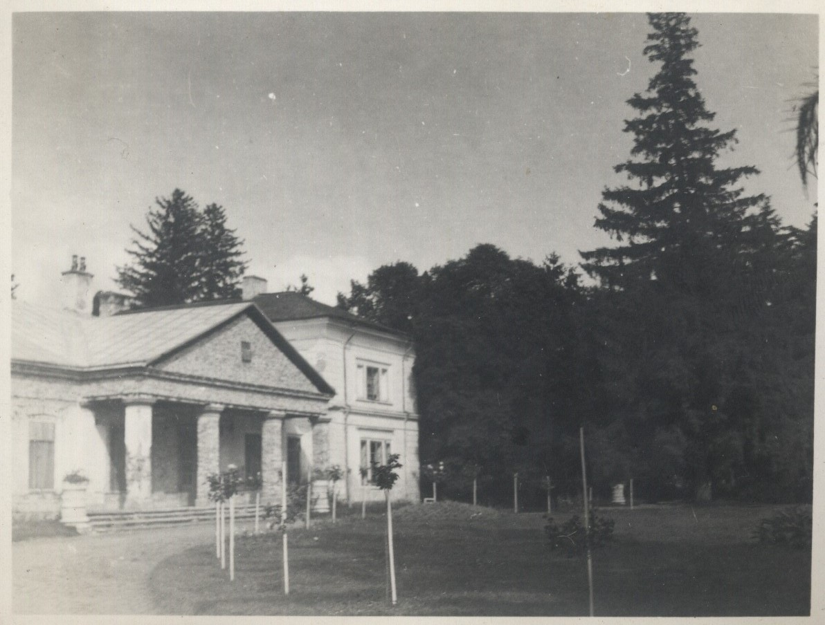 Zdjęcie dworu w Zwiniaczu , zdjęcie zrobiono 1930 r.